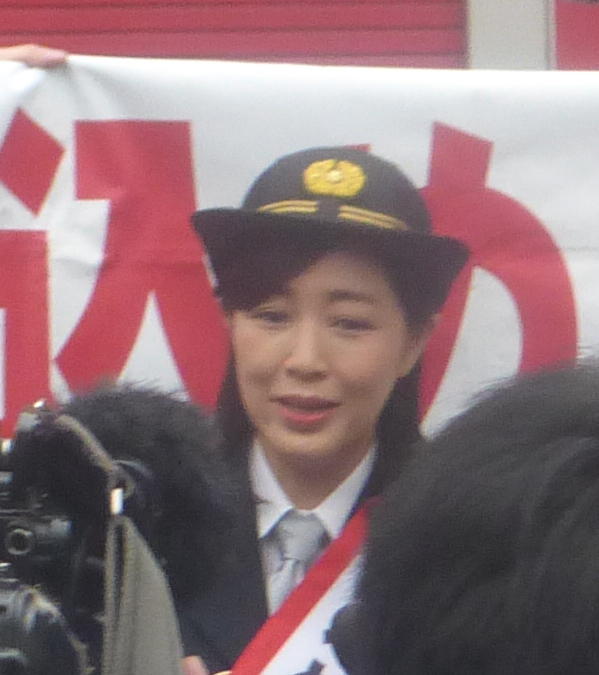 菊池桃子、新橋にて Momoko Kikuchi in Shimbashi)